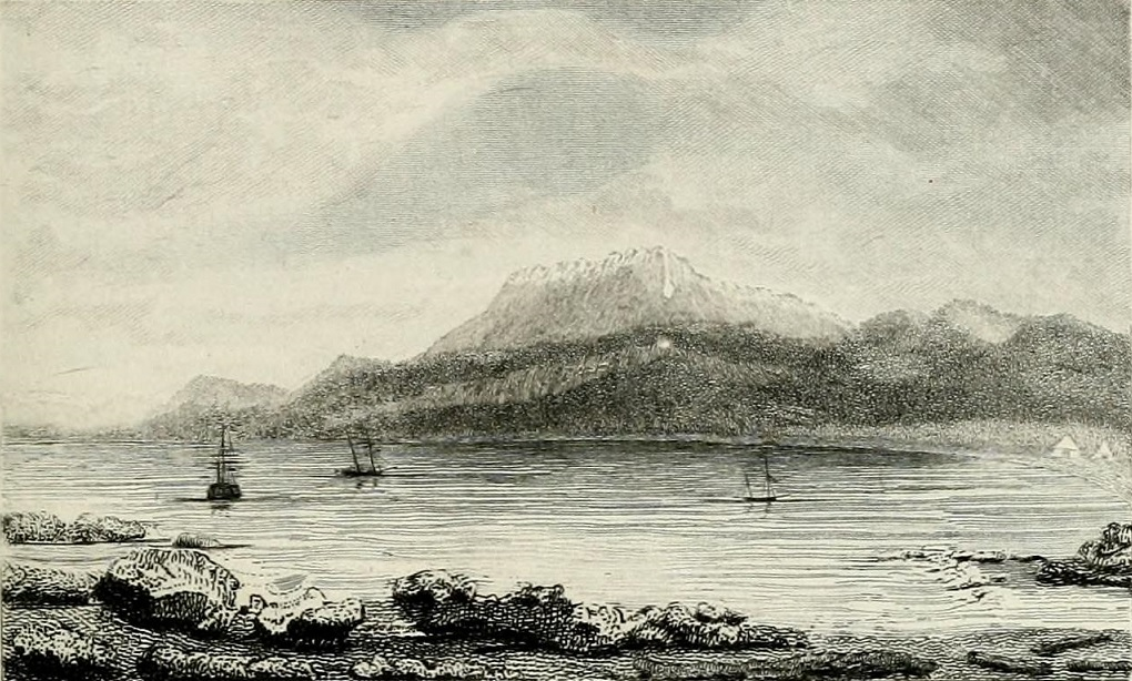 Puerto de Hambre 1827, vista norte, en el Estrecho de Magallanes, durante la expedición del almirante Phillip Parker King, tomado del libro "Narrative of the surveying voyages of His Majesty's Ships Adventure and Beagle between the years 1826 and 1836, describing their examination of the southern shores of South America, and the Beagle's circumnavigation of the globe. Proceedings of the first expedition, 1826-30, under the command of Captain P. Parker King, R.N., F.R.S. London: Henry Colburn".